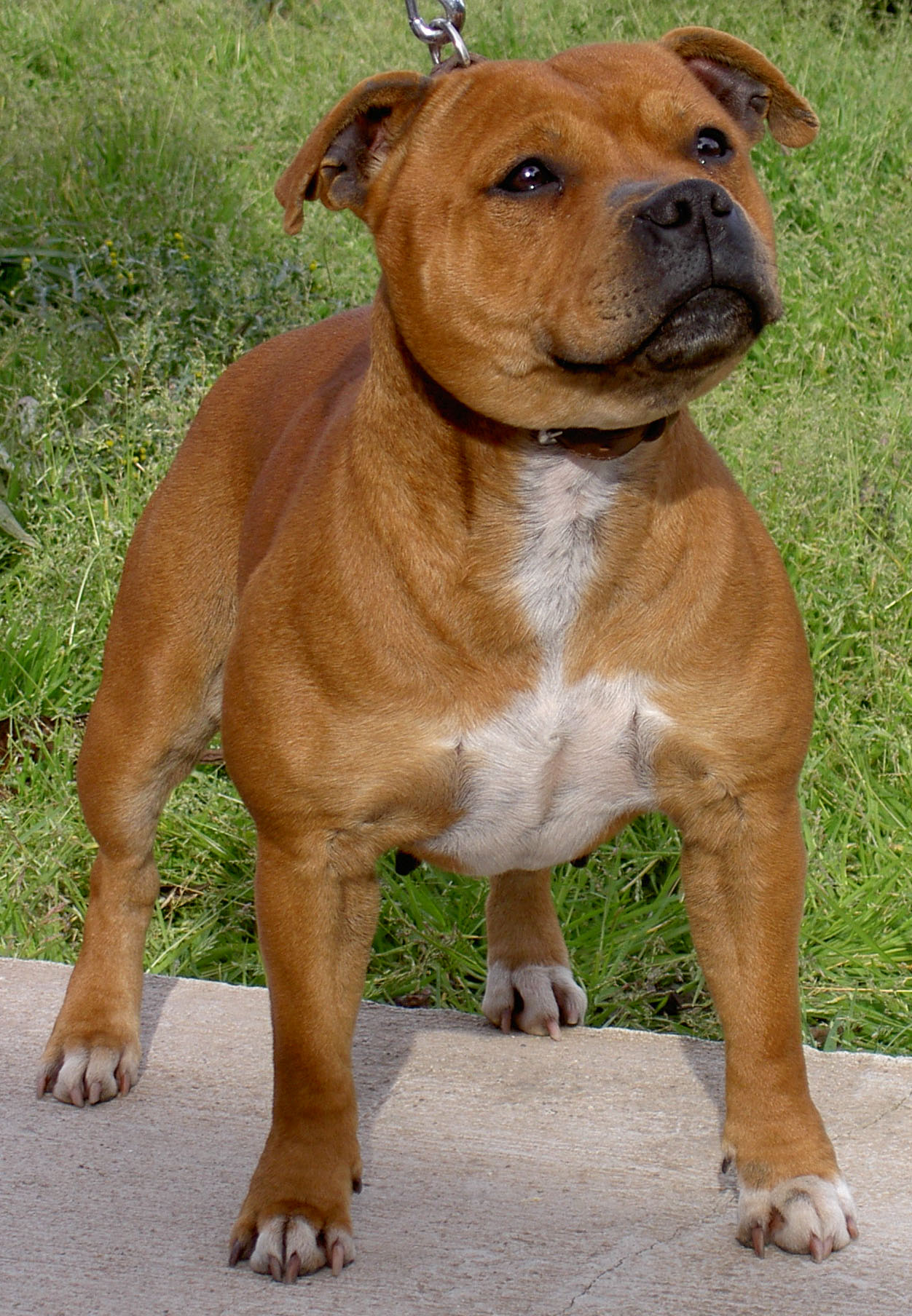 Perro de raza Staffordshire Bull Terrier. Imagen tomada por el dueño del animal.